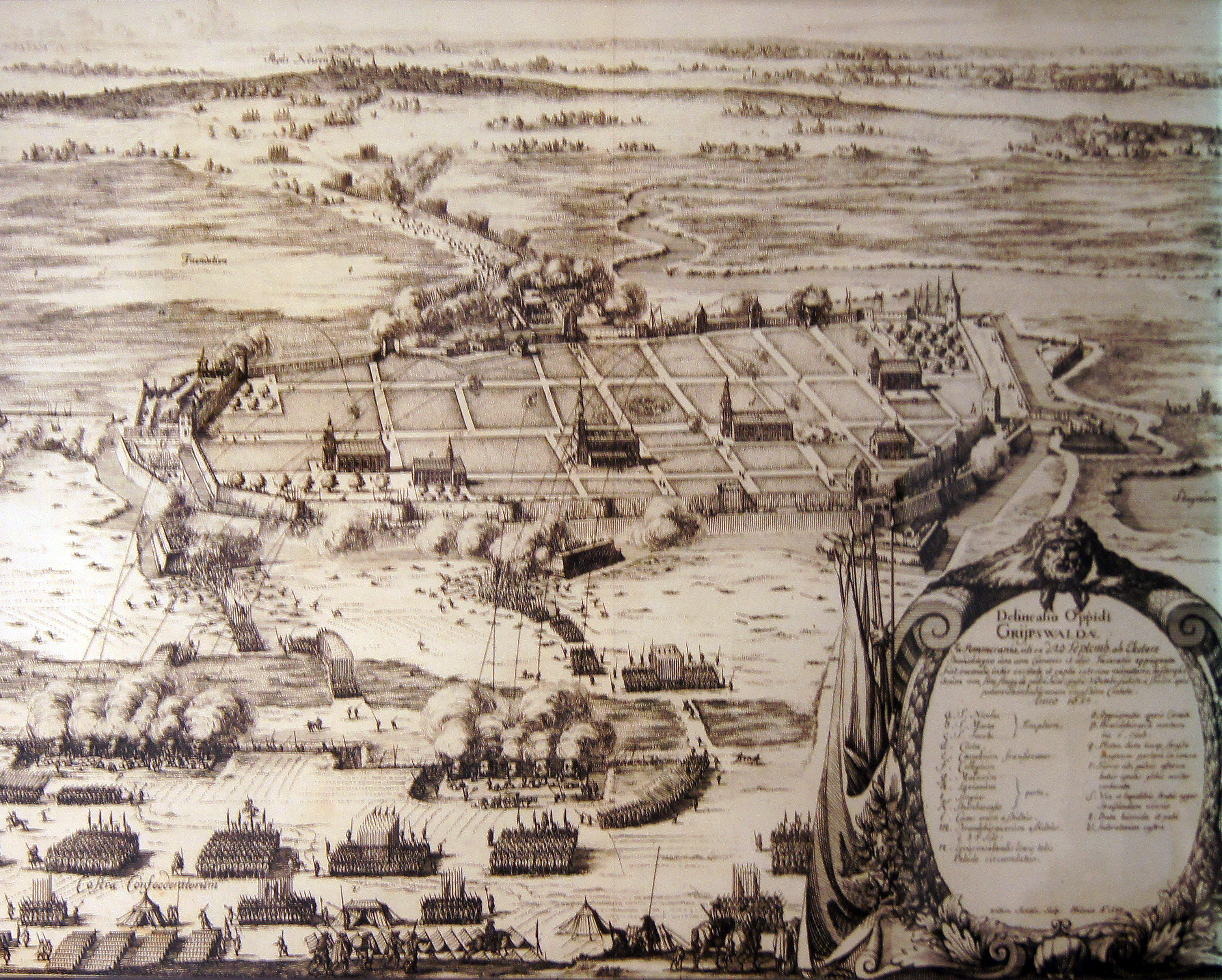 Der Stich zeigt die Belagerung Greifswalds am 3. Oktober 1659 durch den Kürfürsten Friedrich Wilhelm von Brandenburg.